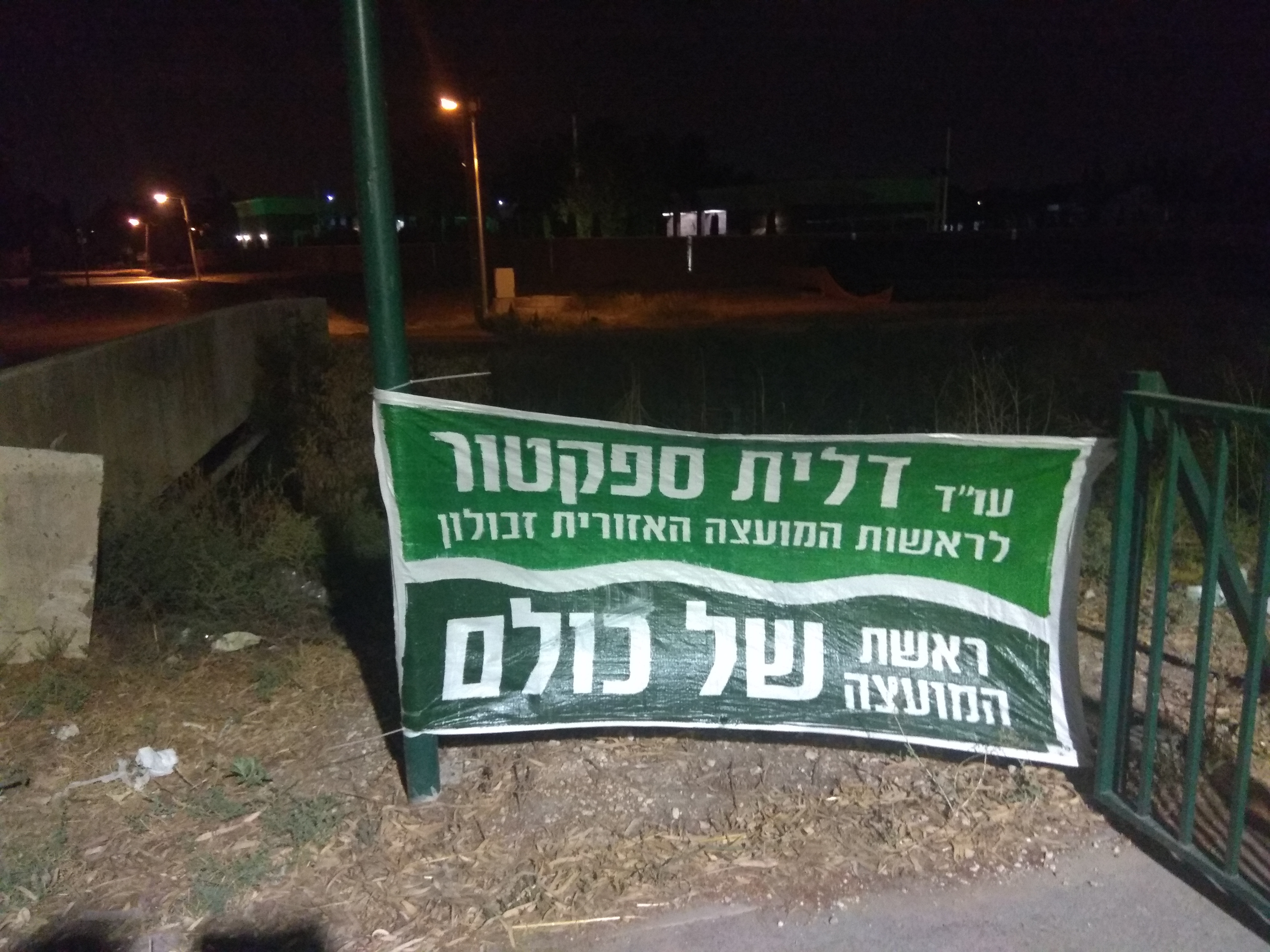 שלט בחירות במועצה האזורית זבולון